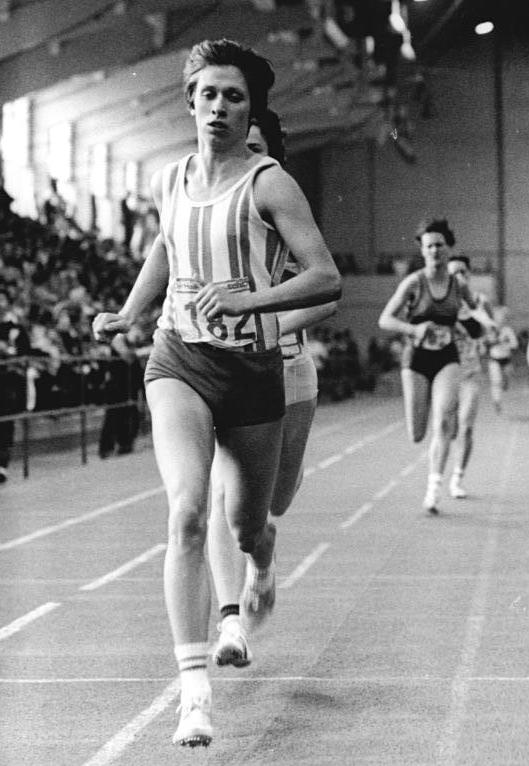 Martina Steuck ADN-ZB Weißflog-14-2-82 Bez. Cottbus: DDR-Meisterschaften in der Leichtathletik- Über 800 m der Frauen siegte die TSC-Läuferin Martina Steuck mit ausgezeichneten 1: 58,4 min. Sie stellte damit die Weltbestleistung von Olga Wachruschowa (UdSSR) aus dem Jahre 1980 ein.